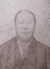 大政、1873年（明治6年）前後の写真。